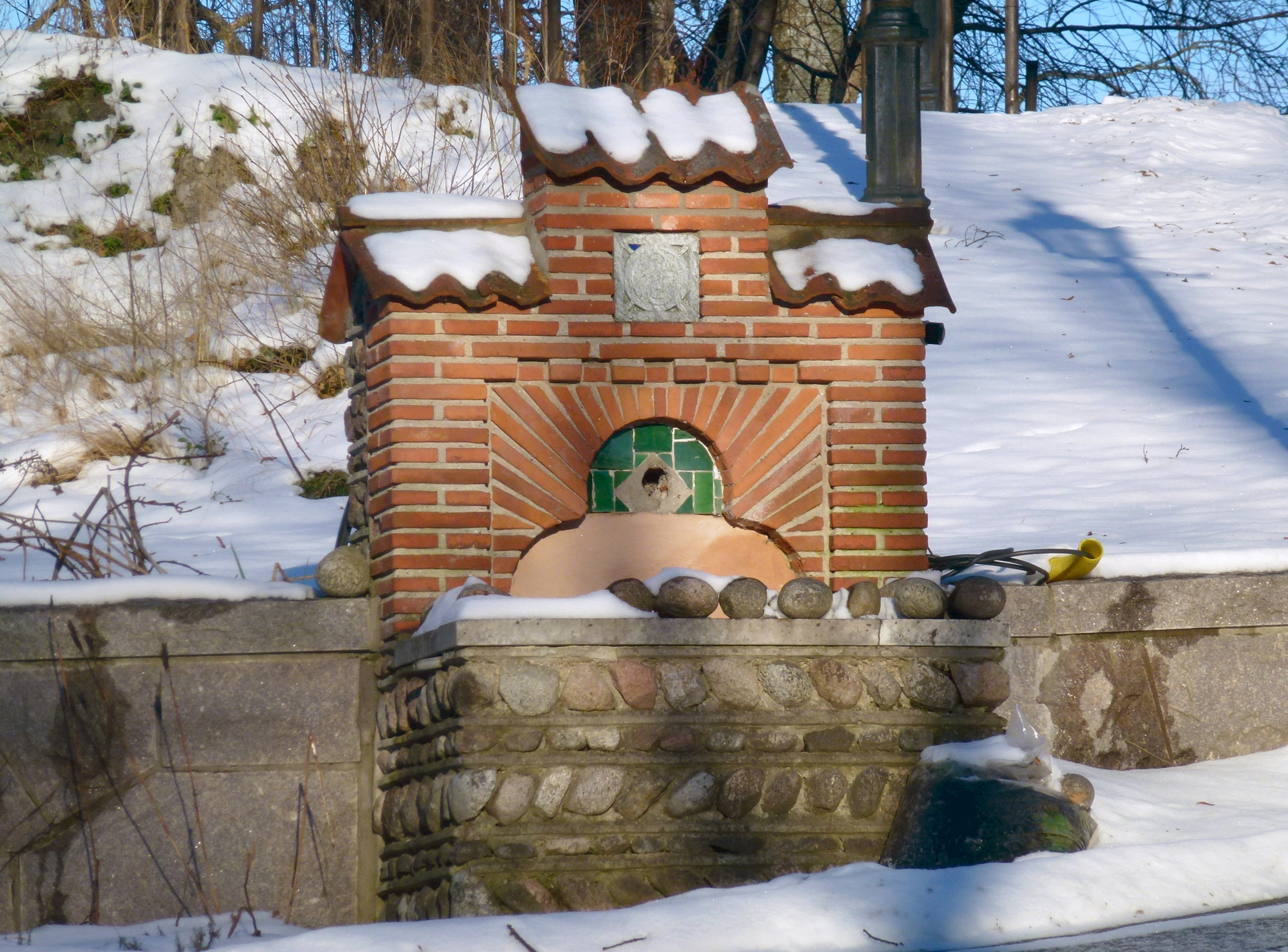 Villa Arken Djursholm, brunn vid entrén